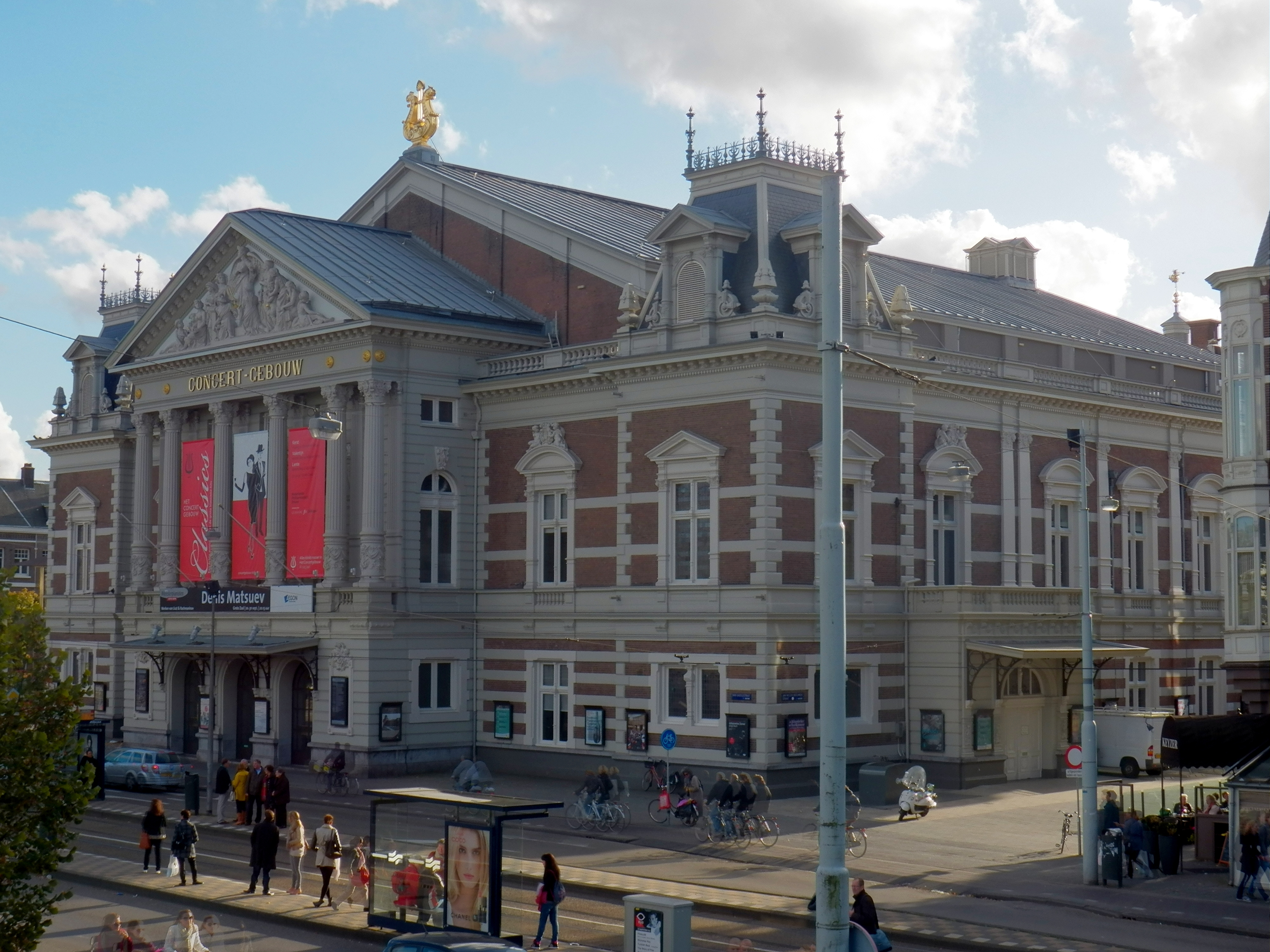 Concertgebouw